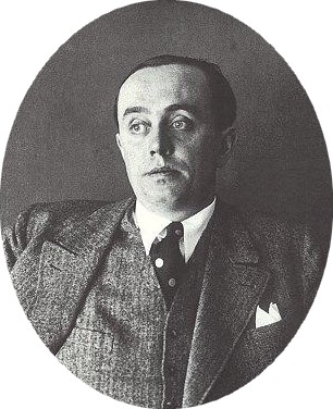 Zdenek Rykr (1900-1940)